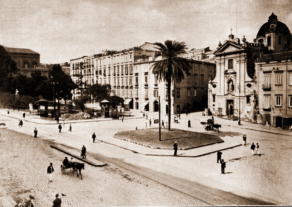 Napoli, Piazza Cavour (dopo la ripavimentazione della strada con cubetti di porfido, da parte del Comune). Autore sconosciuto.